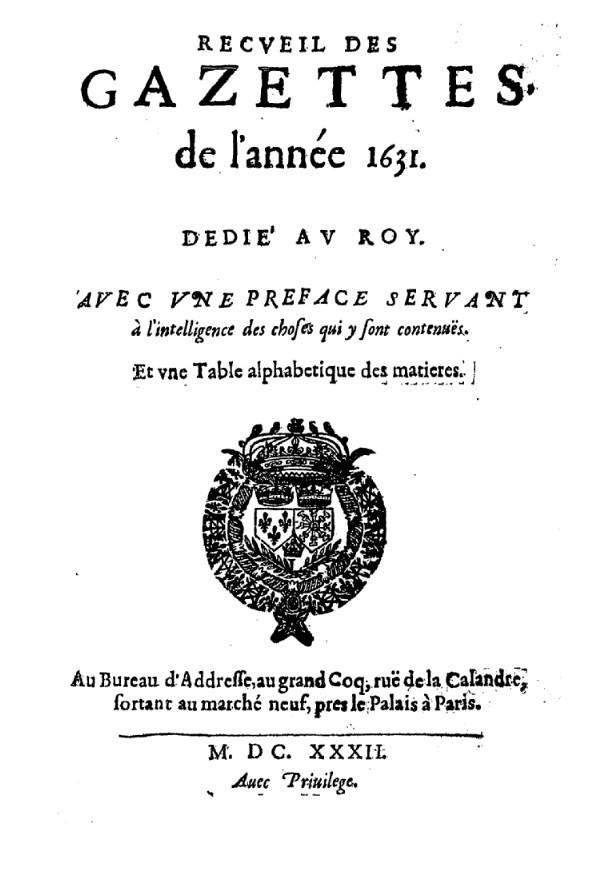 Титульный лист La Gazette за 1631 год.